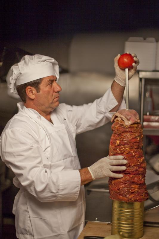 Golden Falafel 883 Hamilton Ave Menlo Park, CA 94025 (650) 323-7759